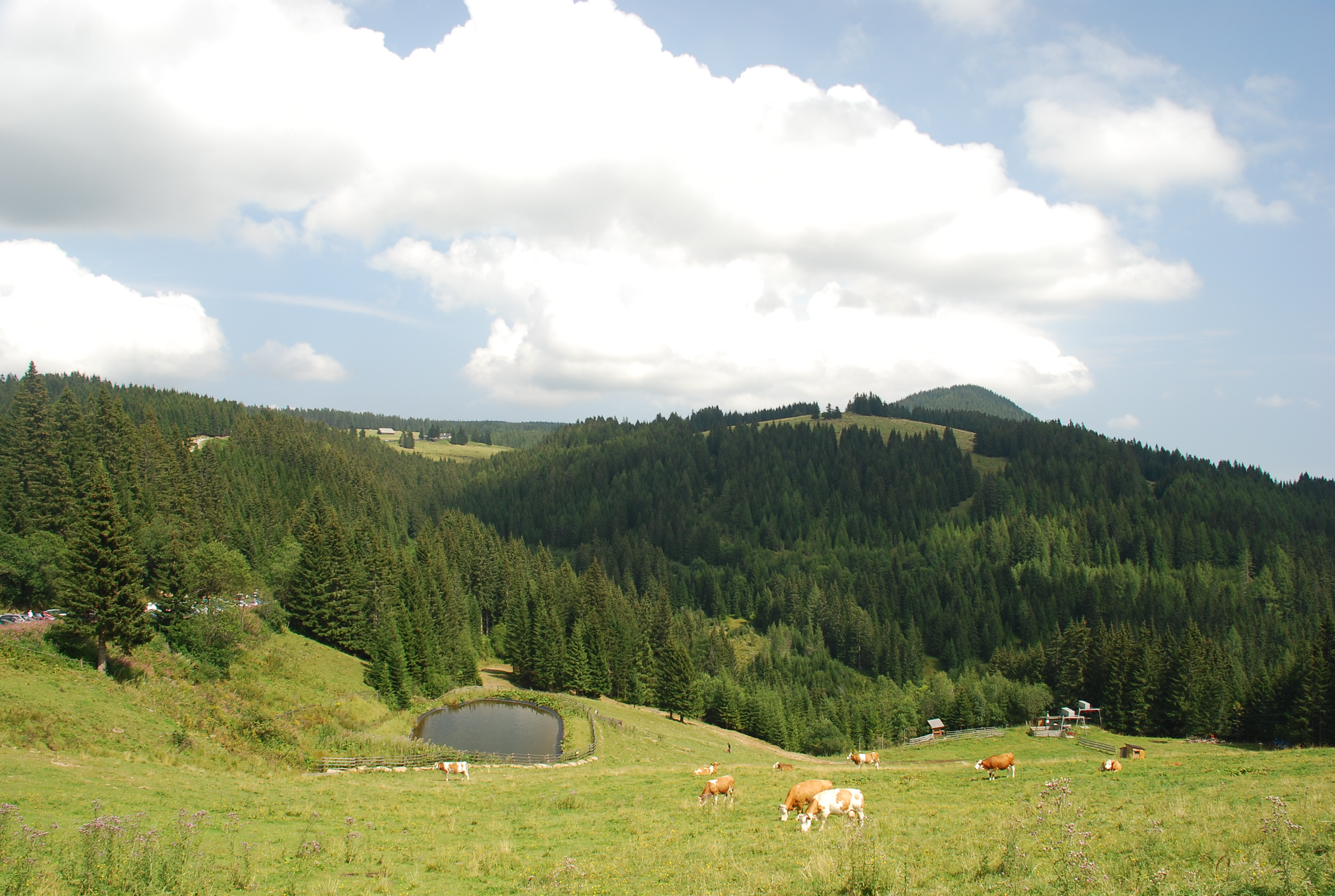 von der Stockeralm auf den Blochriegel und den Schwarzkogel